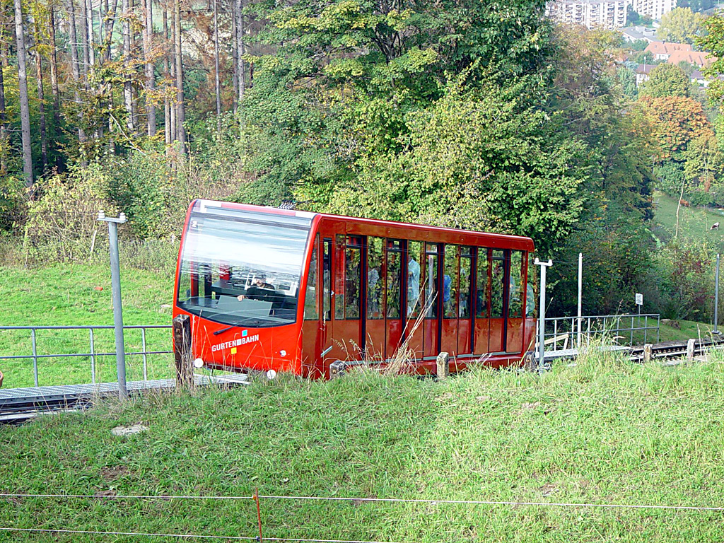 Gurten, Bern, Switzerland